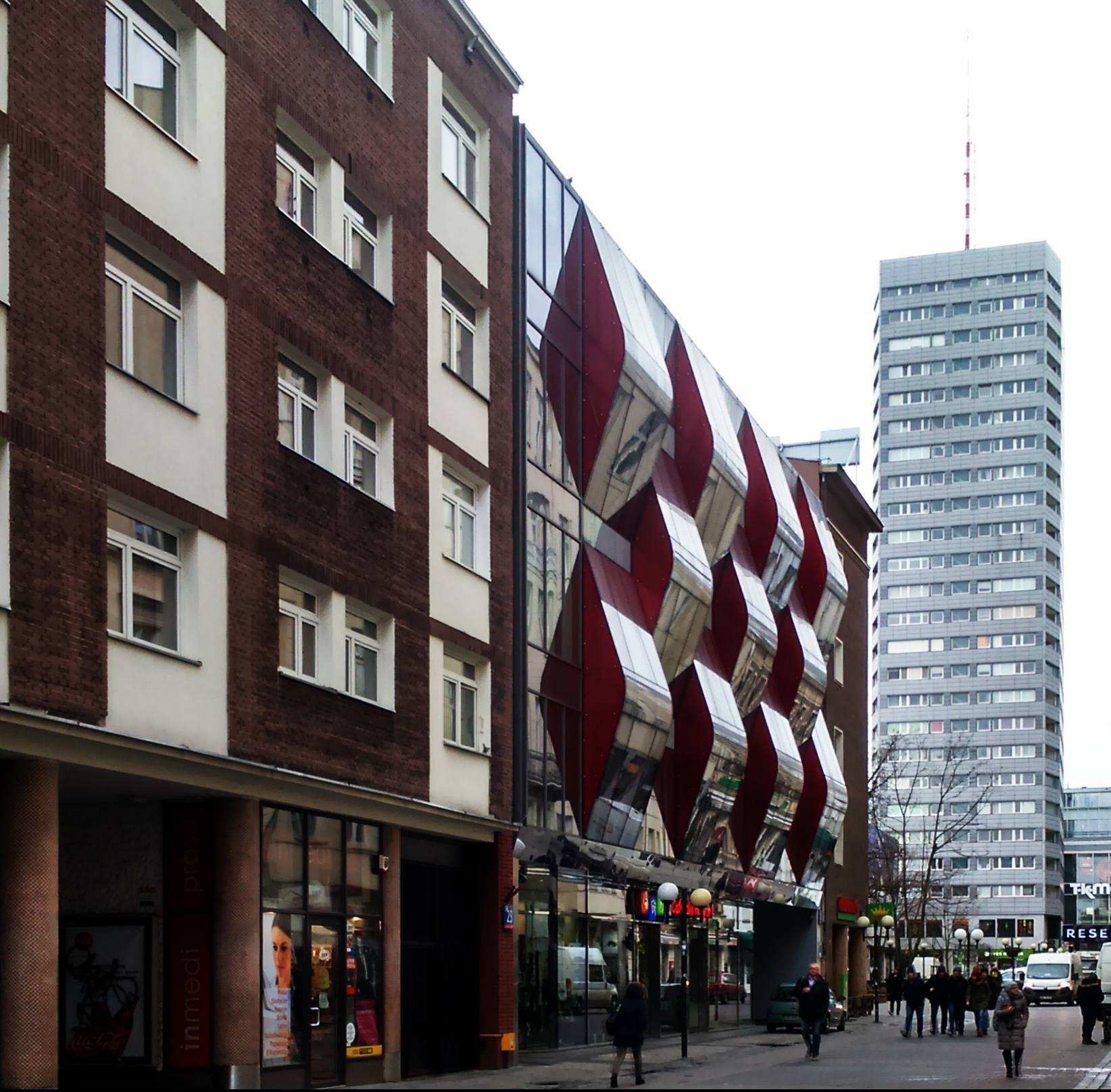 Budynek Chmielna 25 w Warszawie